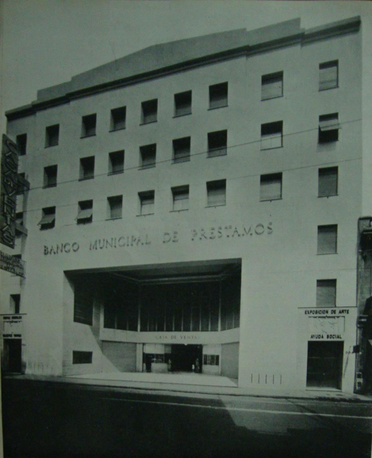 Aspecto original del edificio de Ventas del Banco Municipal de Préstamos, luego Banco Municipal y actualmente Banco Ciudad de Buenos Aires. Calle Esmeralda nº 660.